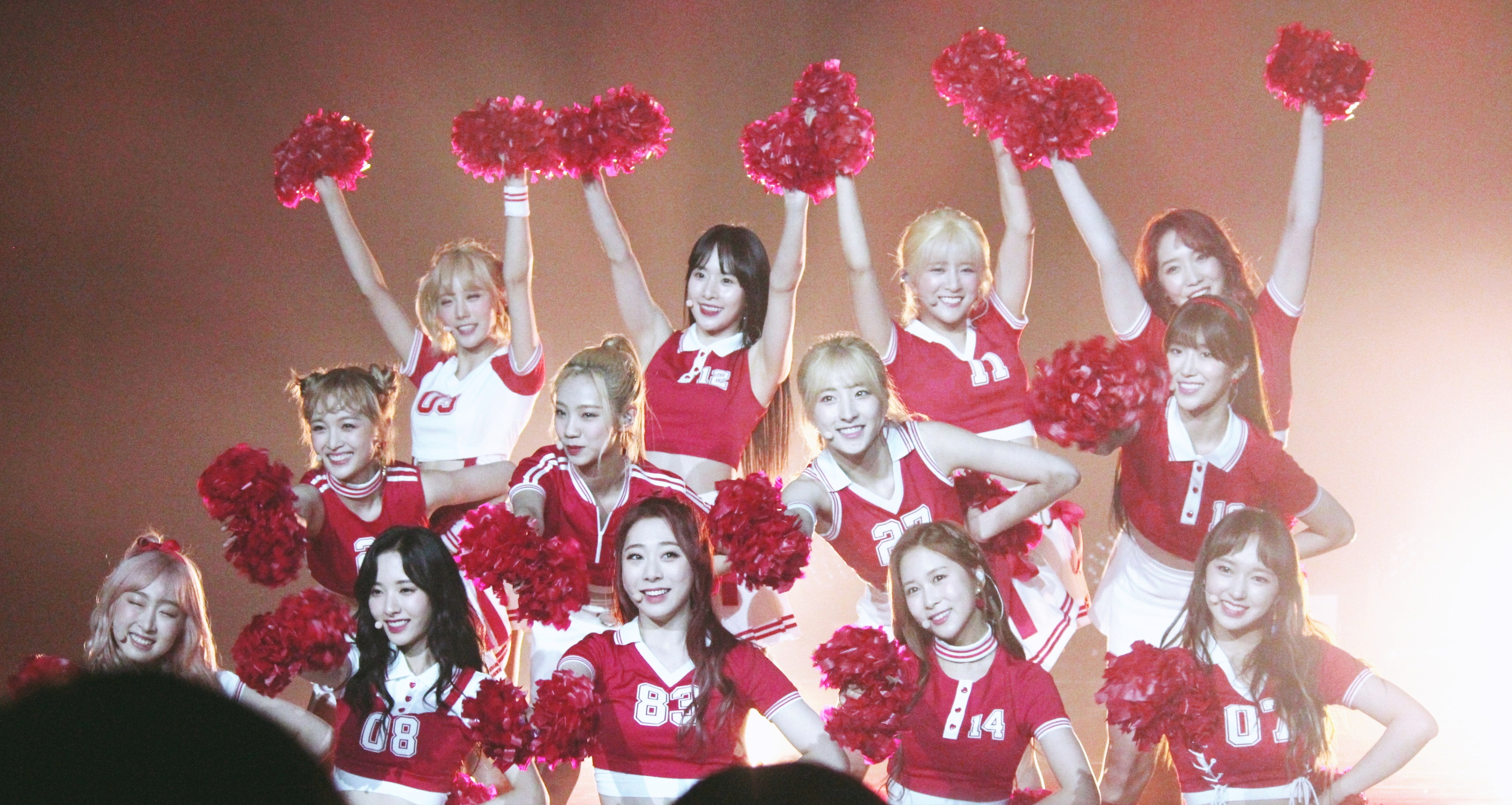 170607 우주소녀 HAPPY 쇼케이스